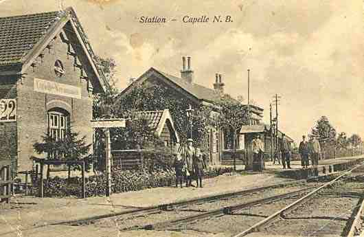 Spoor station Capelle-Vrijhyoeve